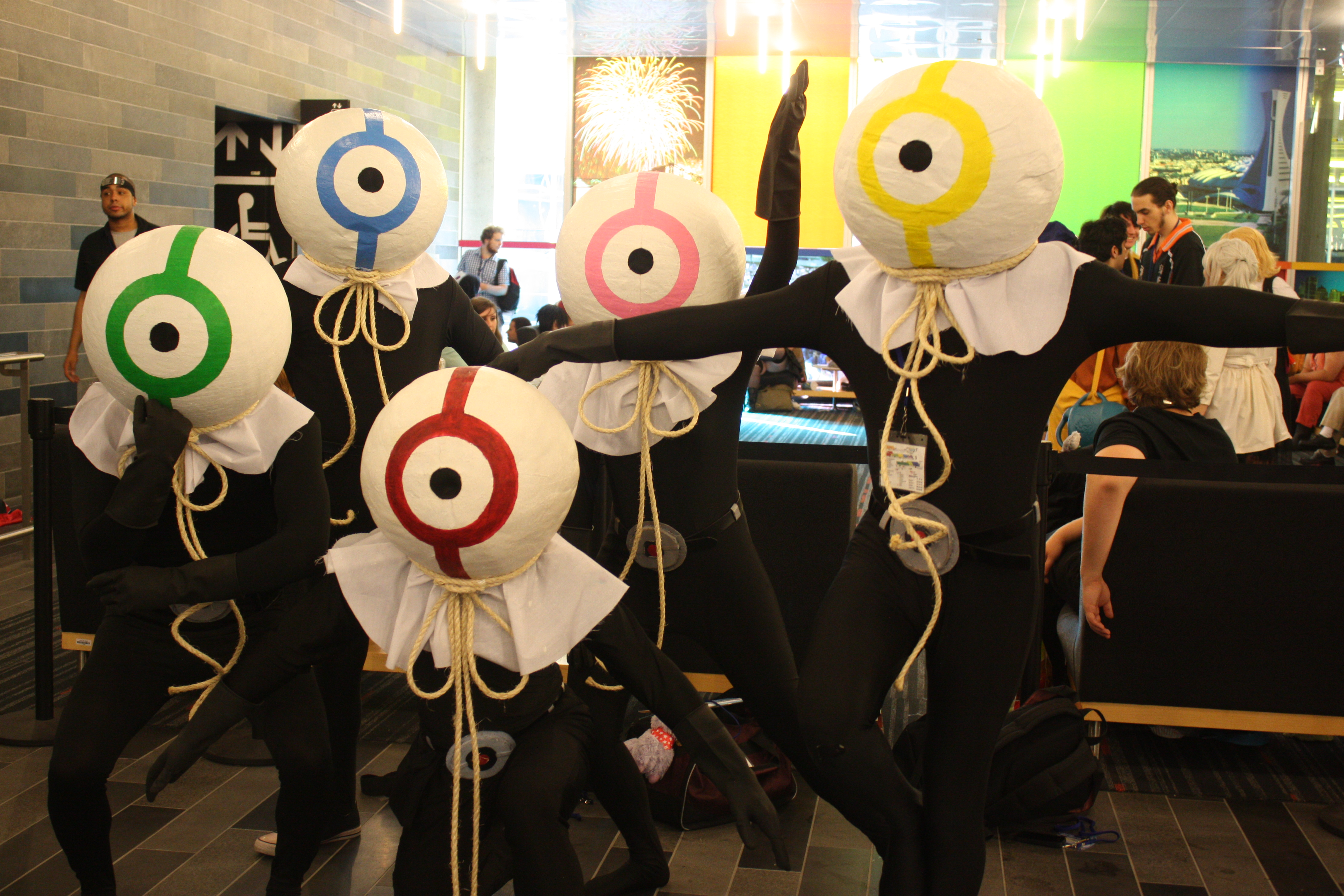 Otakuthon 2014: Twelfth (Mirai Nikki)